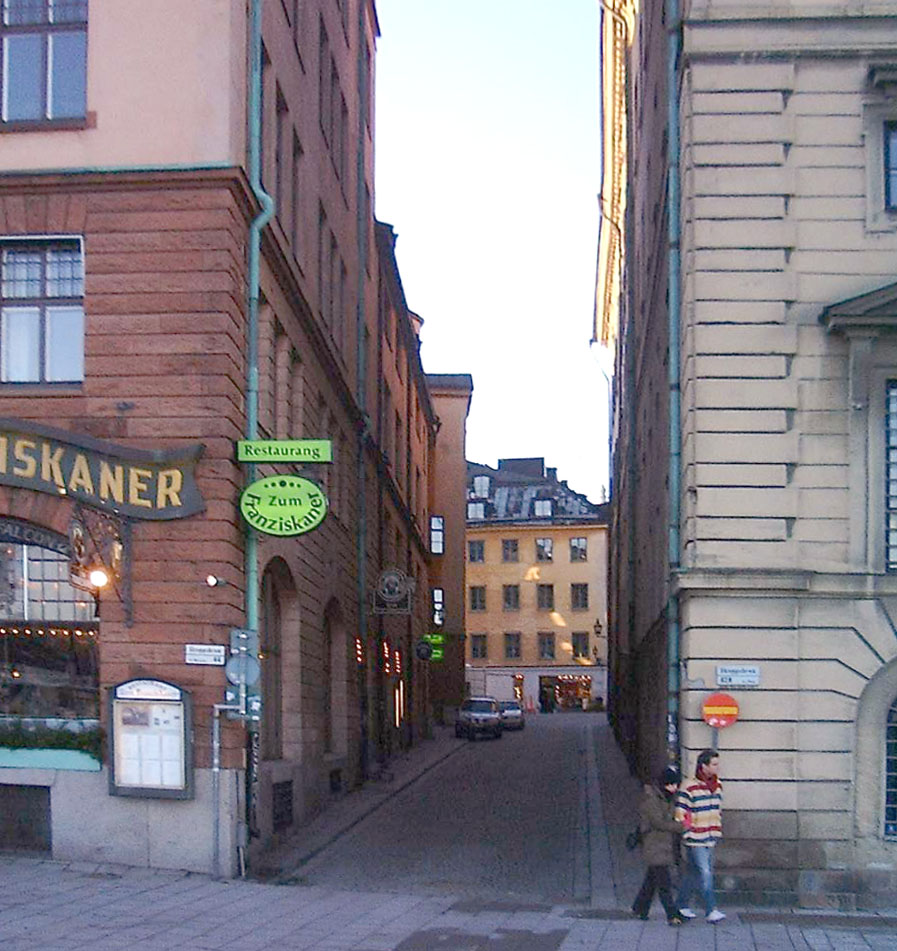 Södra Bankogränd in Gamla stan, Stockholm